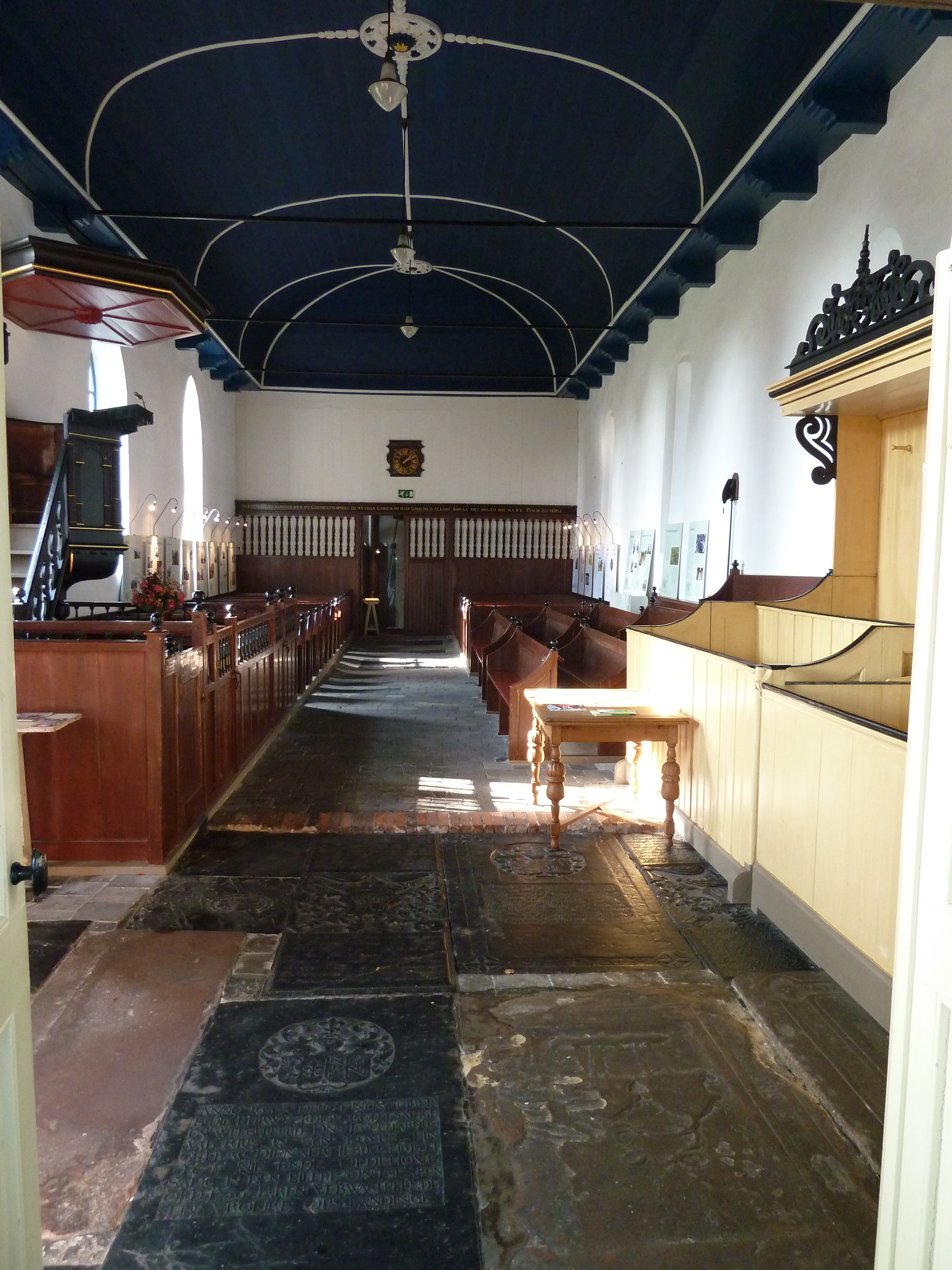 Interieur van de kerk van Niehove gezien vanaf het 'hek'.